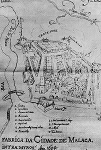 "Fábrica da Cidade de Malaca: intramuros. Anno 1604.", por Manuel Godinho de Erédia.